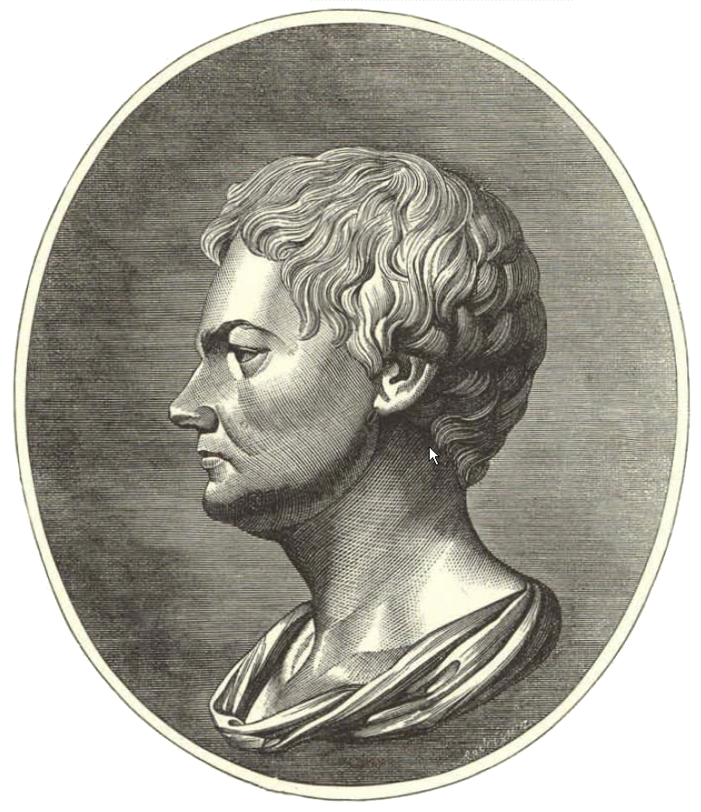 Gravure d'Antonio Rodríguez représentant Francisco de Miranda, parue dans le périodique colombien "Papel Periódico Ilustrado" (1881-1887).